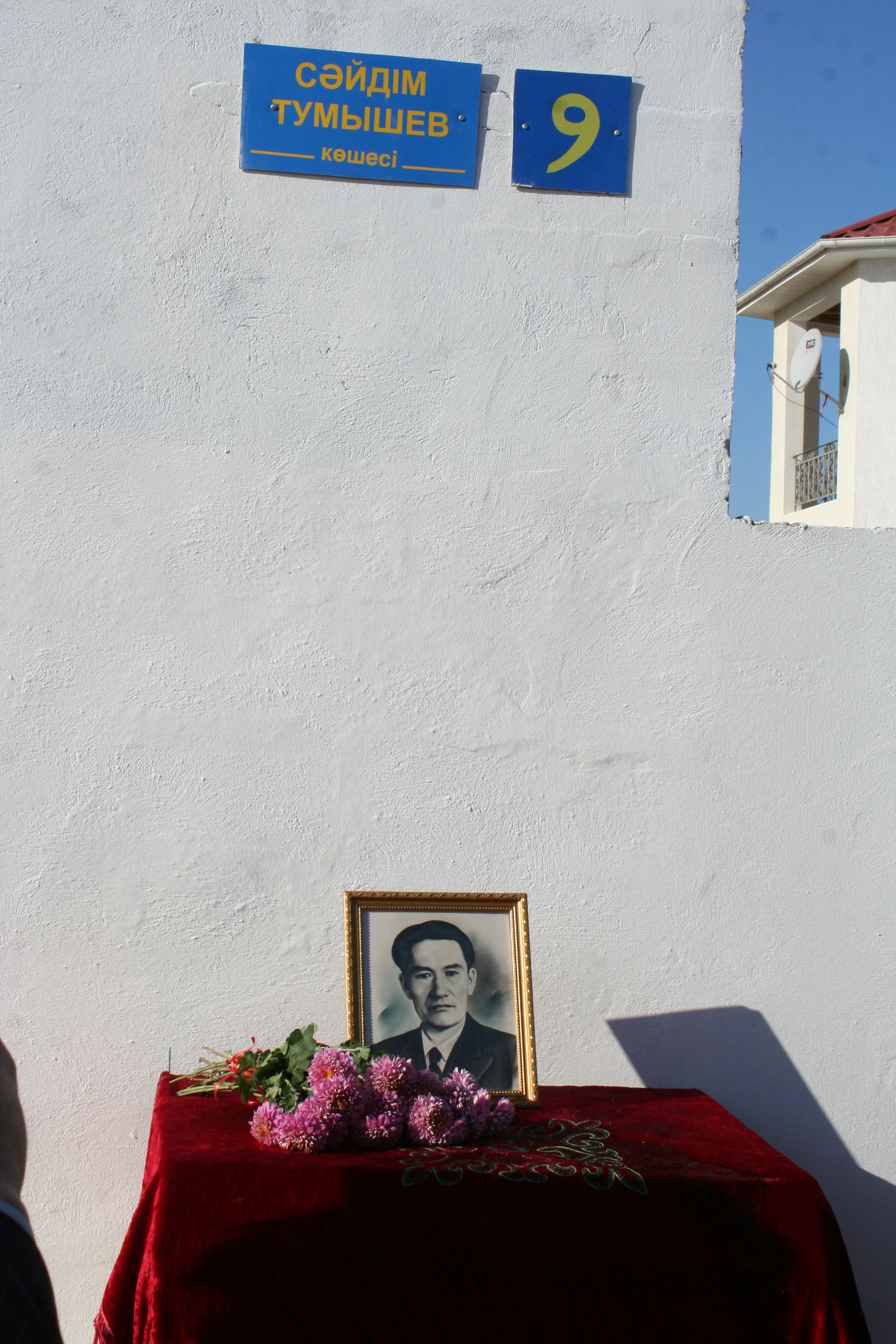 Сайын аулы. Сәйдім Тумышев көшесі.